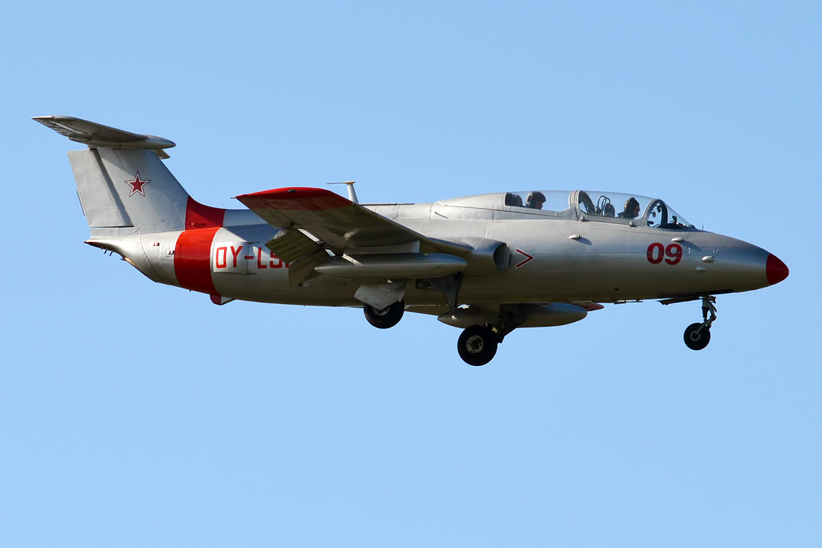 Private, OY-LSD, Aero Vodochody L-29 Delfin